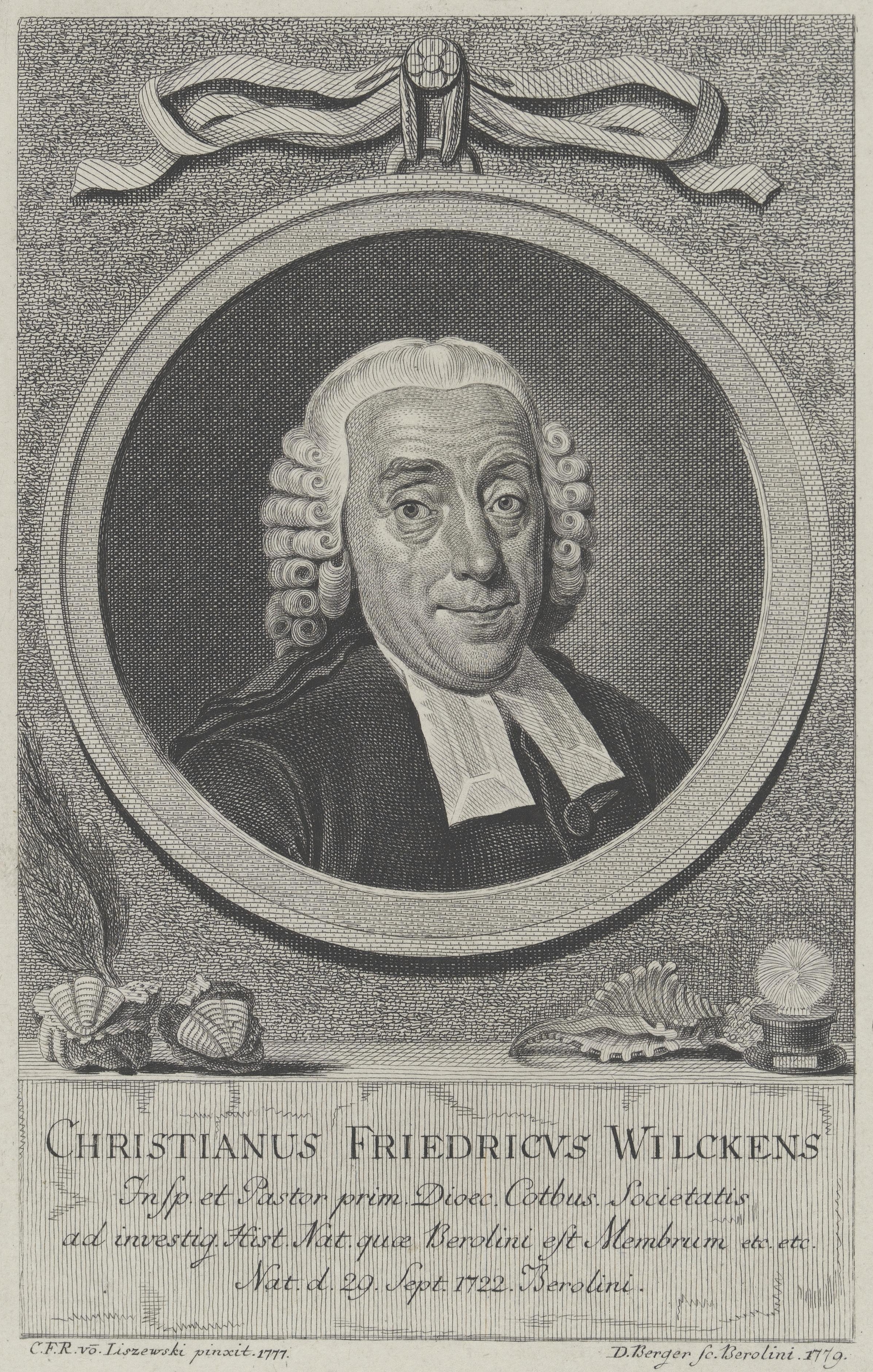 Bildnis des Christianus Friedricus Wilckens. Berlin, 1779